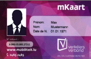 Personaliséiert mKaart fir den ëffentlechen Transport. Déi jeweileg Abonnementer ginn elektronesch op d'Kaart gelueden.